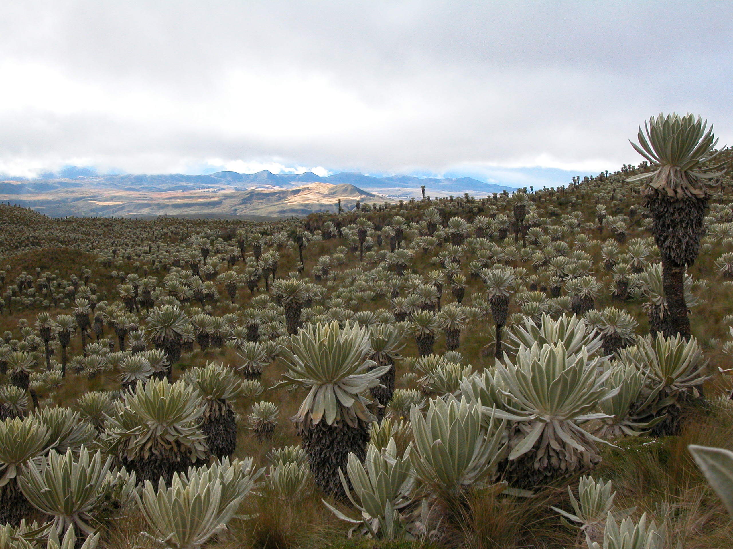 Reserva El Ángel, Frailejones prov Carchi(1)